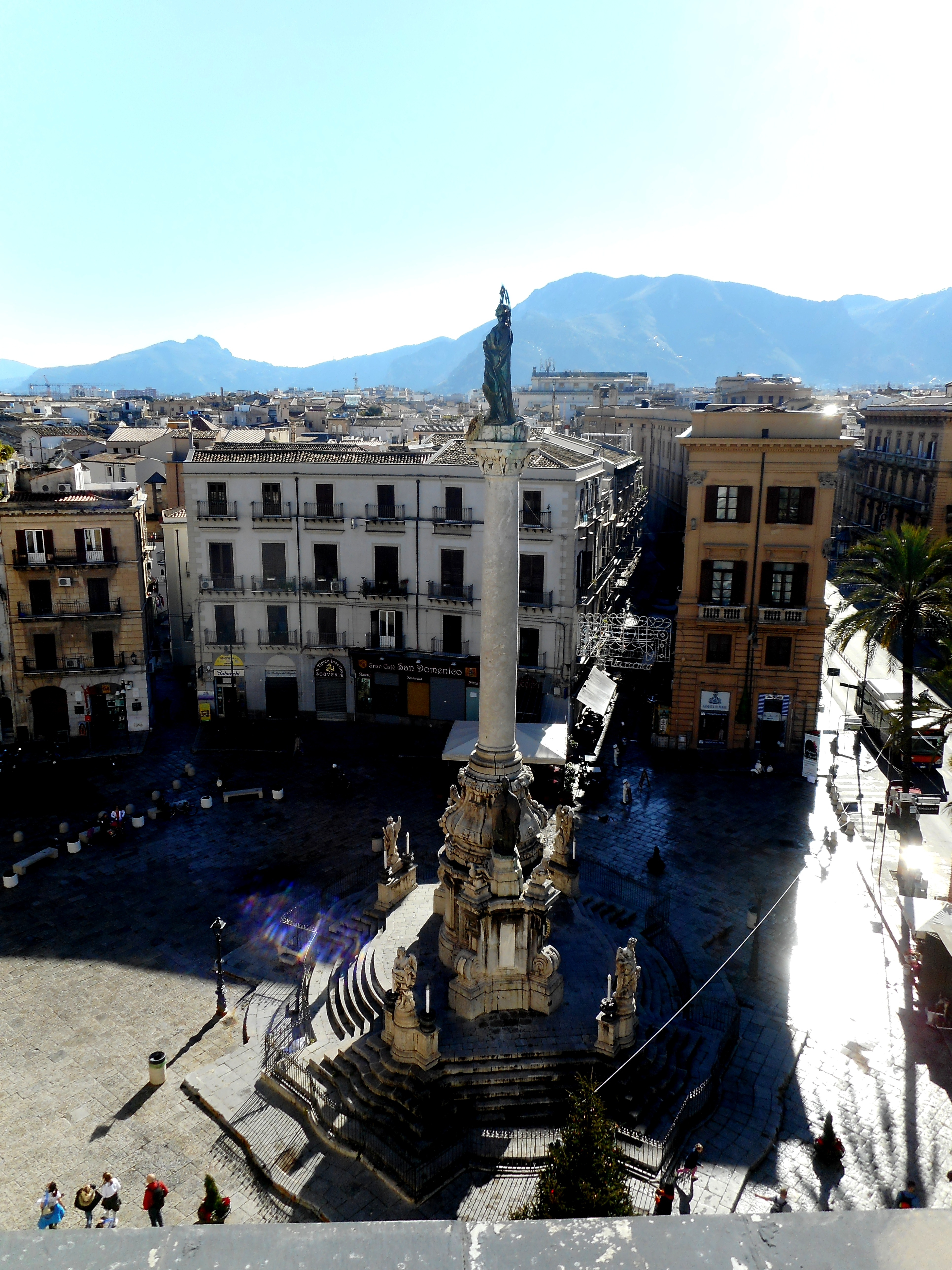 Vista dall'alto della Colonna dell'Immacolata a piazza San Domenico